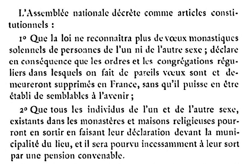 Assemblée nationale, décret du 13 février 1790, articles 1 et 2 ; in "La Révolution française et les congrégations : exposé historique et documents", Alphonse Aulard, 1903, p. 100. Suppression des ordres et congrégations monastiques.